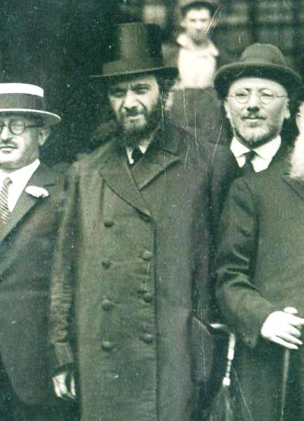 רבי משה מרדכי אפשטיין בעת מסע הרבנים לארה"ב וקנדה